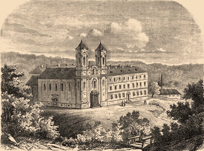 Máriacsaládi zárda 1860-ból /Vasárnapi Ujság 1860. 36. szám/ [1]